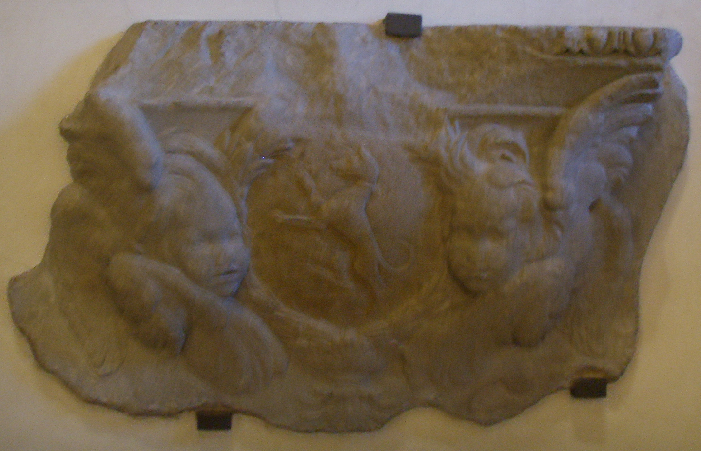 Loggia_del_Bigallo, Desiderio da Settignano, Stemma degli Altoviti tra cherubini (1450_circa)